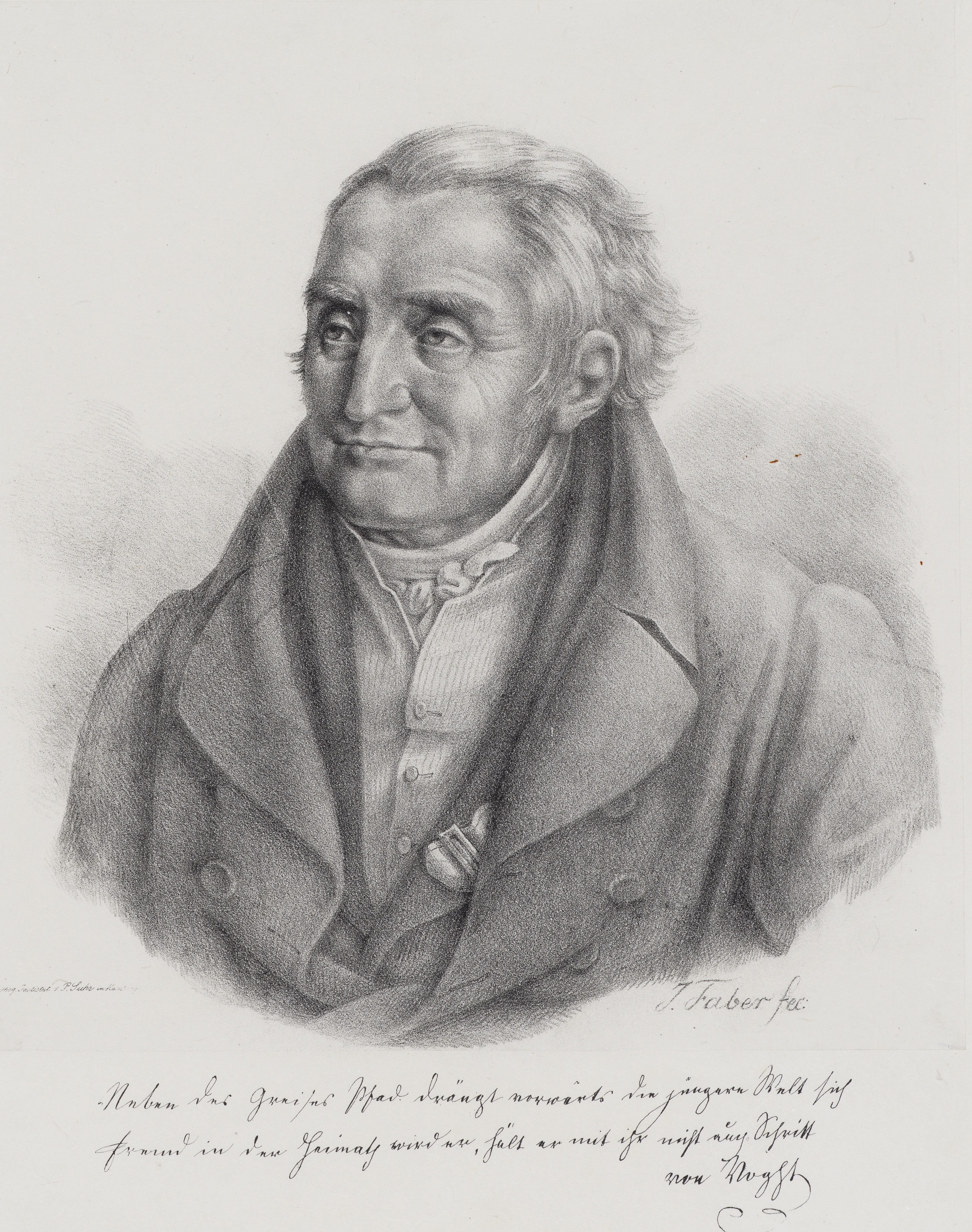 Bildnis von Caspar von Voght